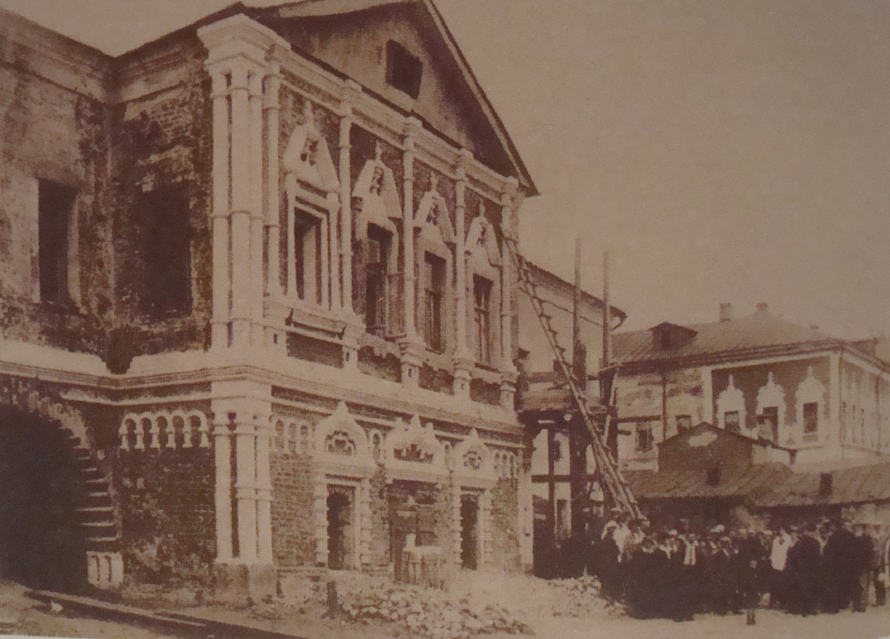 Палаты В.В. Голицына в Охотном ряду. Дворцовый фасад. Начало 1920-х годов.